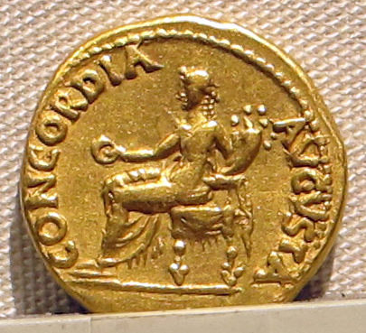 Palazzo Massimo alle Terme